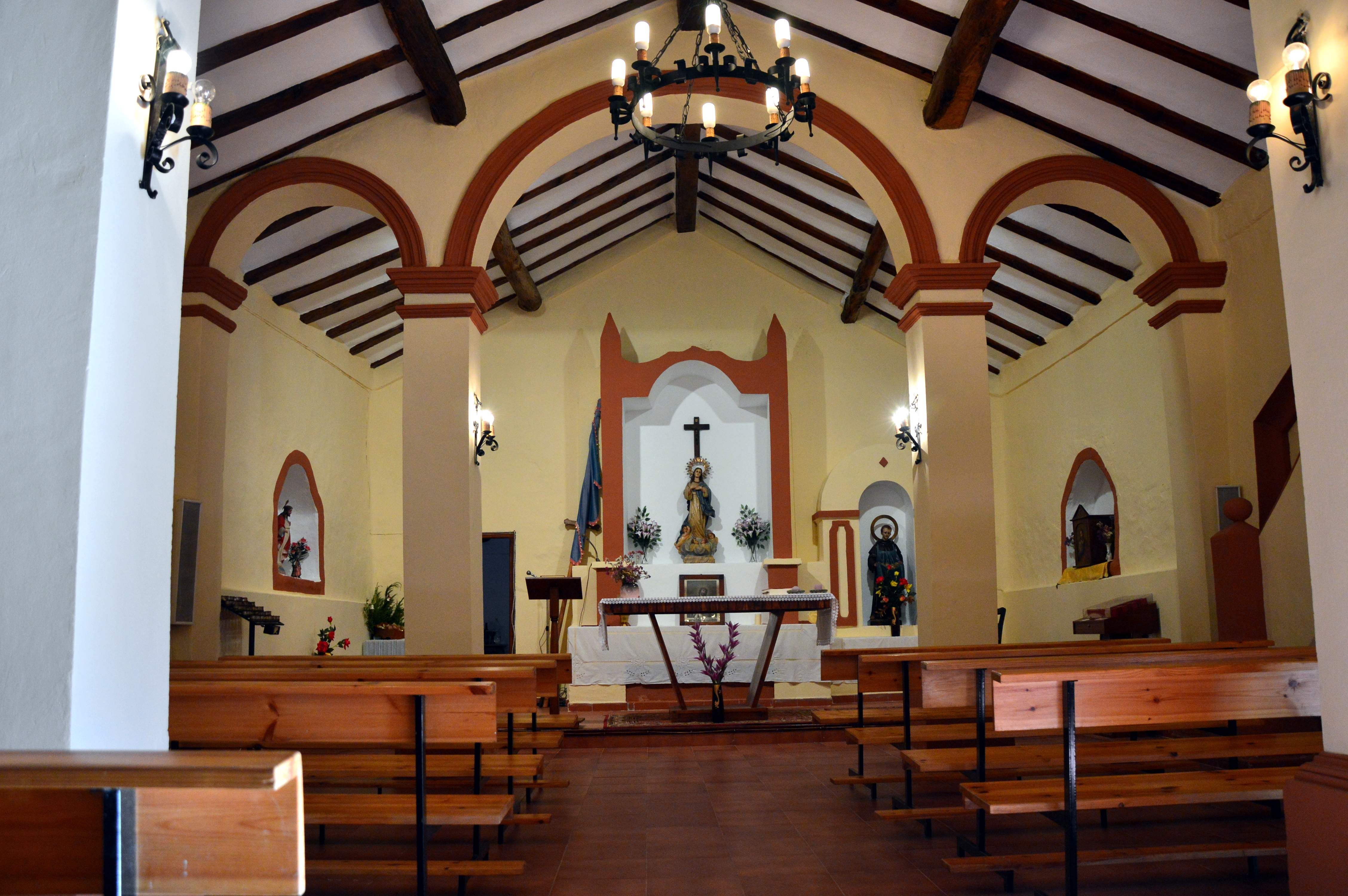 Interior de la Ermita de la Purísima Concepción en Cuesta del Rato (Castielfabib, Valencia), con detalle naves y arcadas (2018).